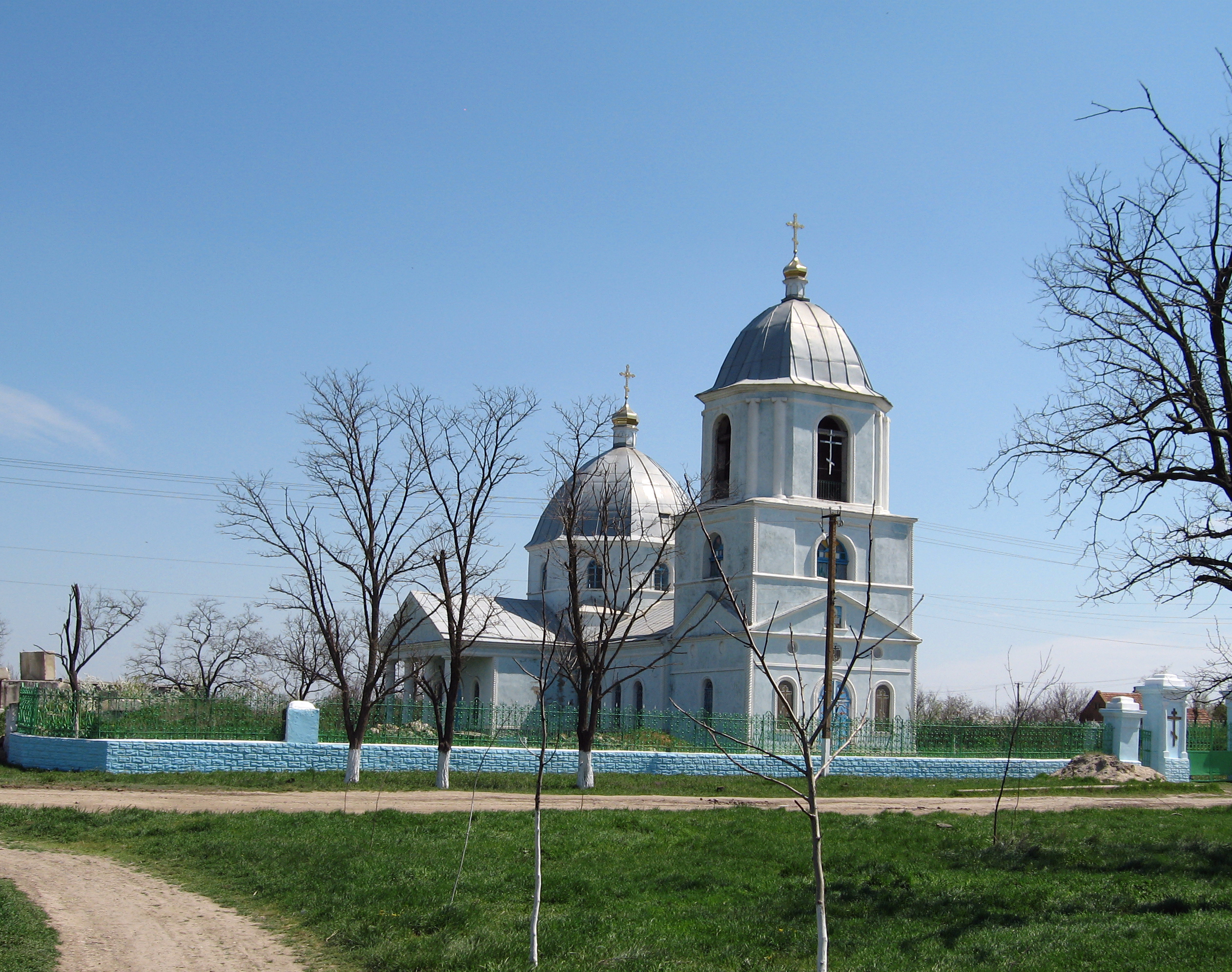 с. Бармашово. Церковь